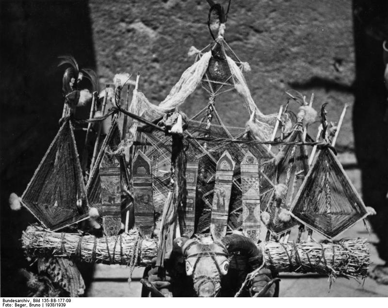 Pede, Geisterabwehrzauber in unserer Unterkunft